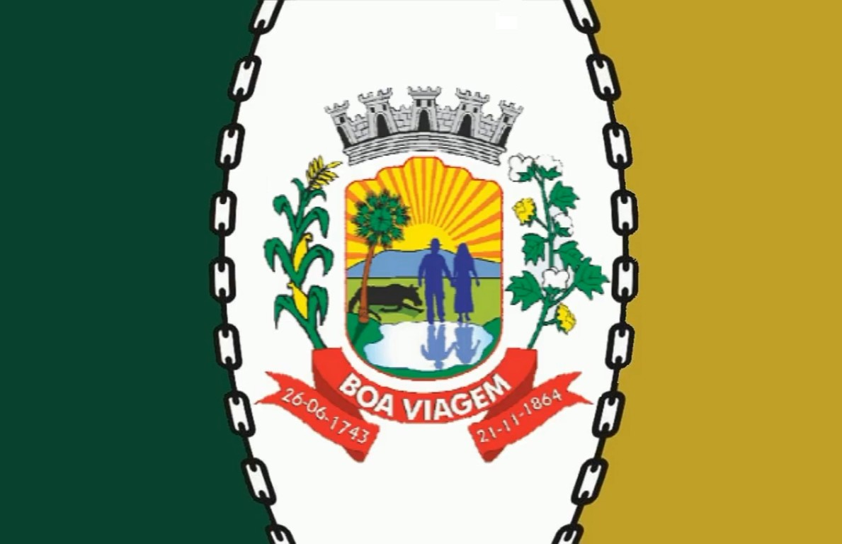 Bandeira de Boa Viagem, Brasil